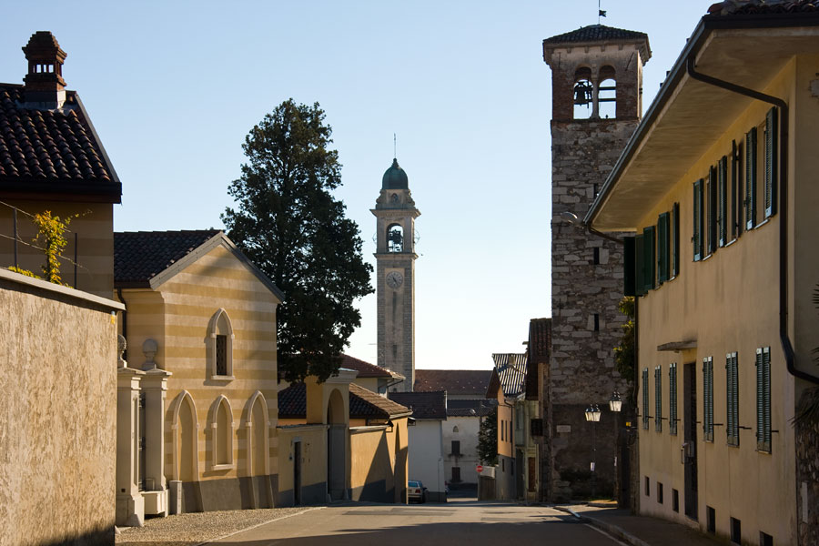 Scorcio di Veruno con la Chiesa di Santa Maria Assunta sulla destra ed il campanile della parrocchiale al centro.